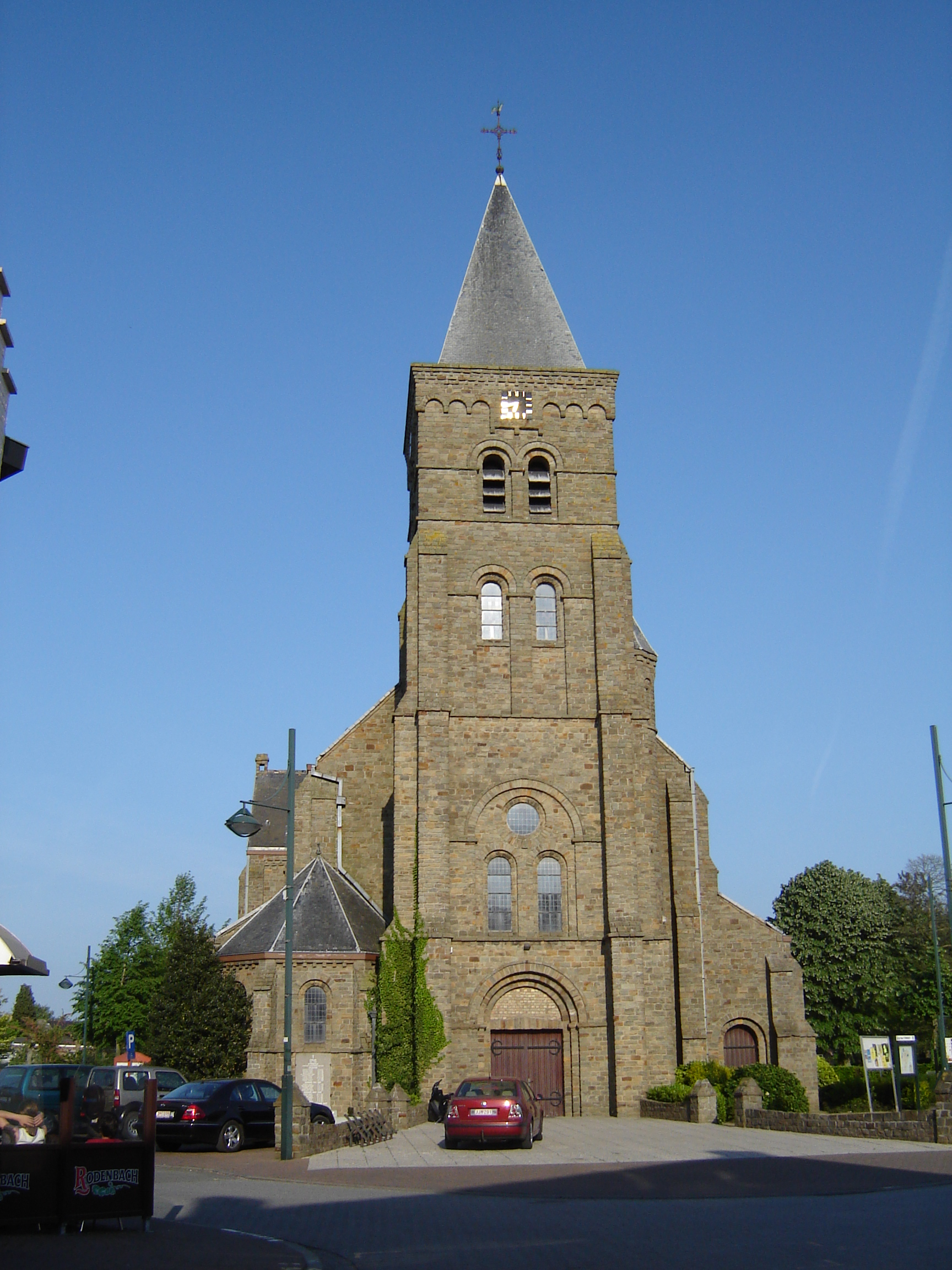 Sint-Jozefskerk in WijnendaleChurch of Saint Joseph in Wijnendale, Torhout, West Flanders, Belgium